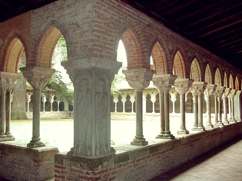 Cloître de l'abbaye de Saint-Pierre de Moissac, St Jacques avec sa barbe pointue et saint Jean aux pieds nus (à droite)